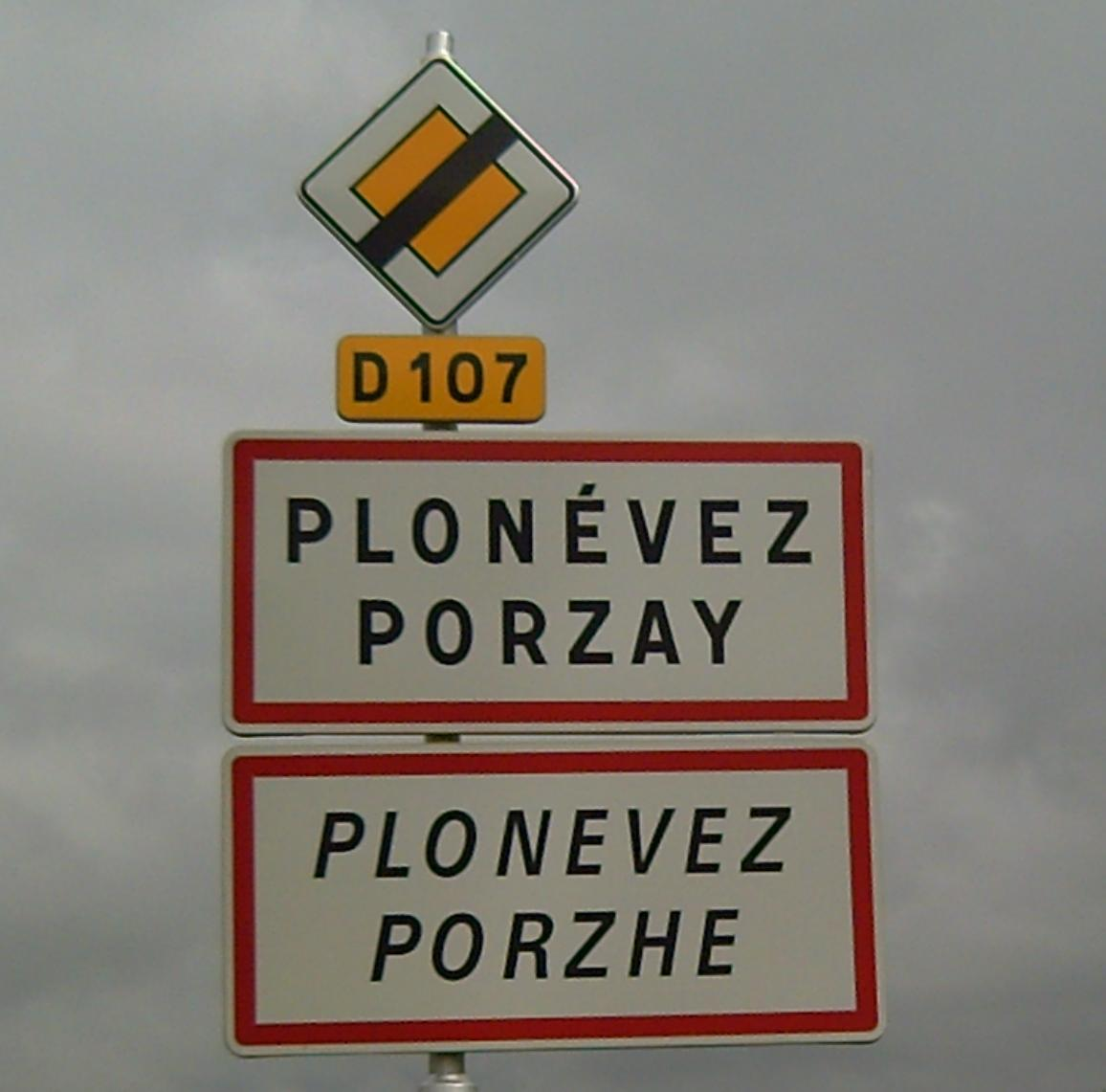 Panneau de la commune de Plonévez-Porzay